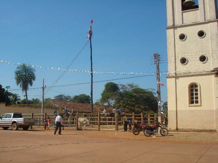 Parte de la fachada de la catedral y el "jocheo" de toros llevado a cabo en el corral construido para la celebración de la fiesta patronal de Magdalena Bolivia.